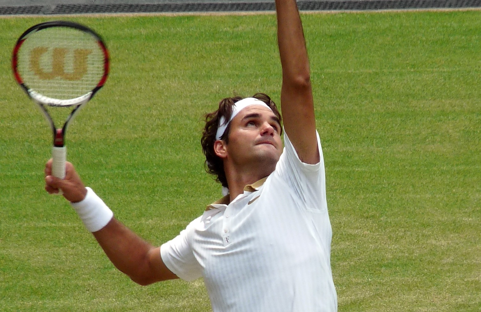 Roger Federer in 2009 at Wimbledon